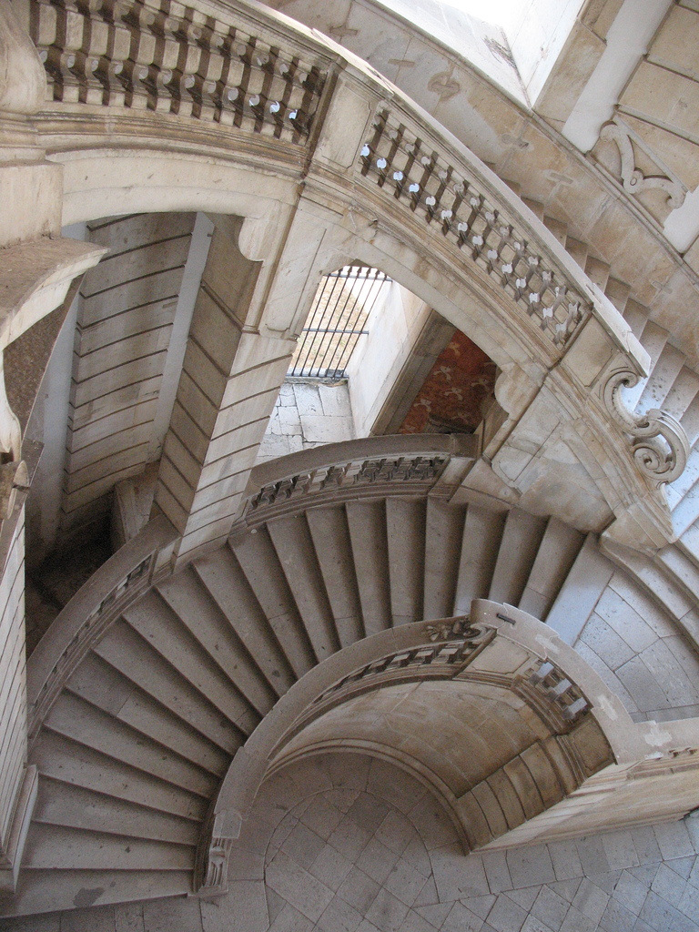 Scala monumentale della Certosa di Padula - Italy